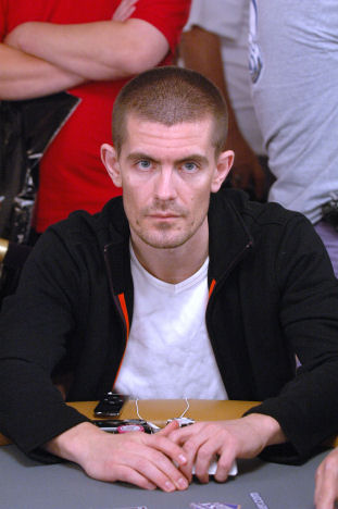 Gus Hansen at WSOP 2006 Rio, Las Vegas